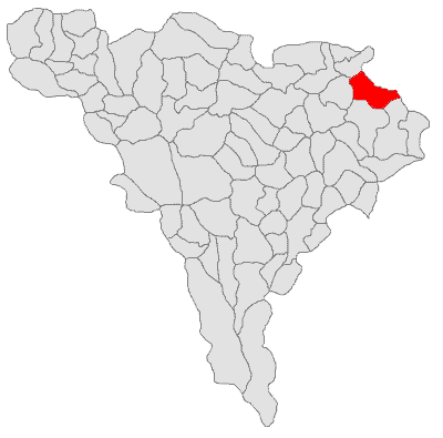 Categorie:Hărţi ale judeţului Alba